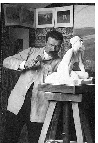 Per Hasselberg, eg. Karl Petter Hasselberg, (före 1870 Åkesson), född 1 januari 1850 i Hasselstad, död 25 juli 1894 i Stockholm, svensk skulptör. Verksam i Paris 1876–1890.